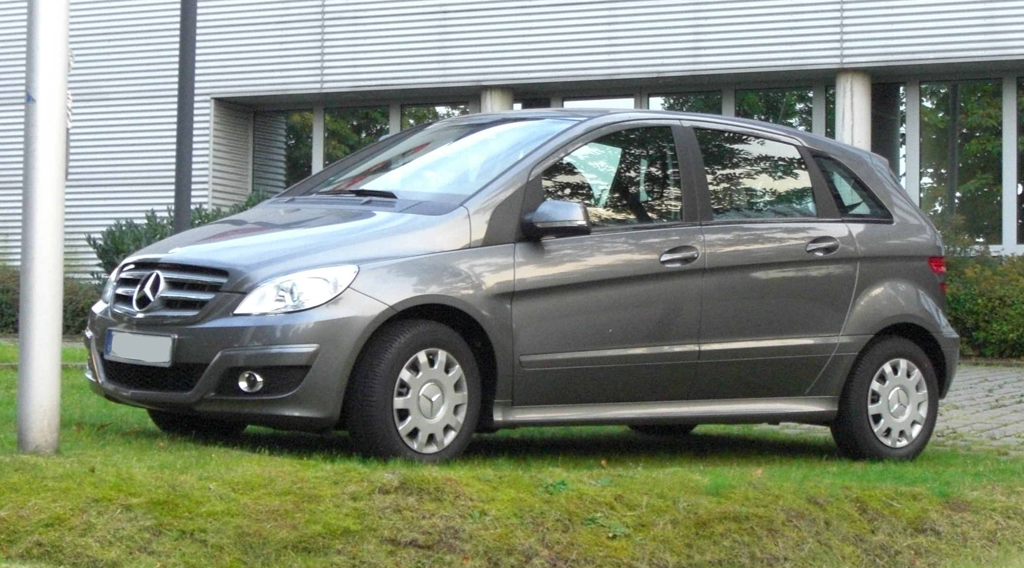 Mercedes B-Klasse Facelift